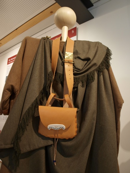 Alamannische Kleidungsrekonstruktion eines Mannes im Alamannen-Museum Vörstetten.